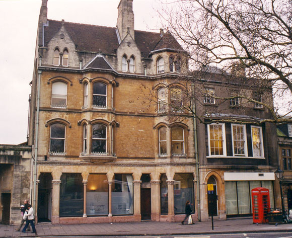 Ioannou Centre at the University of Oxford